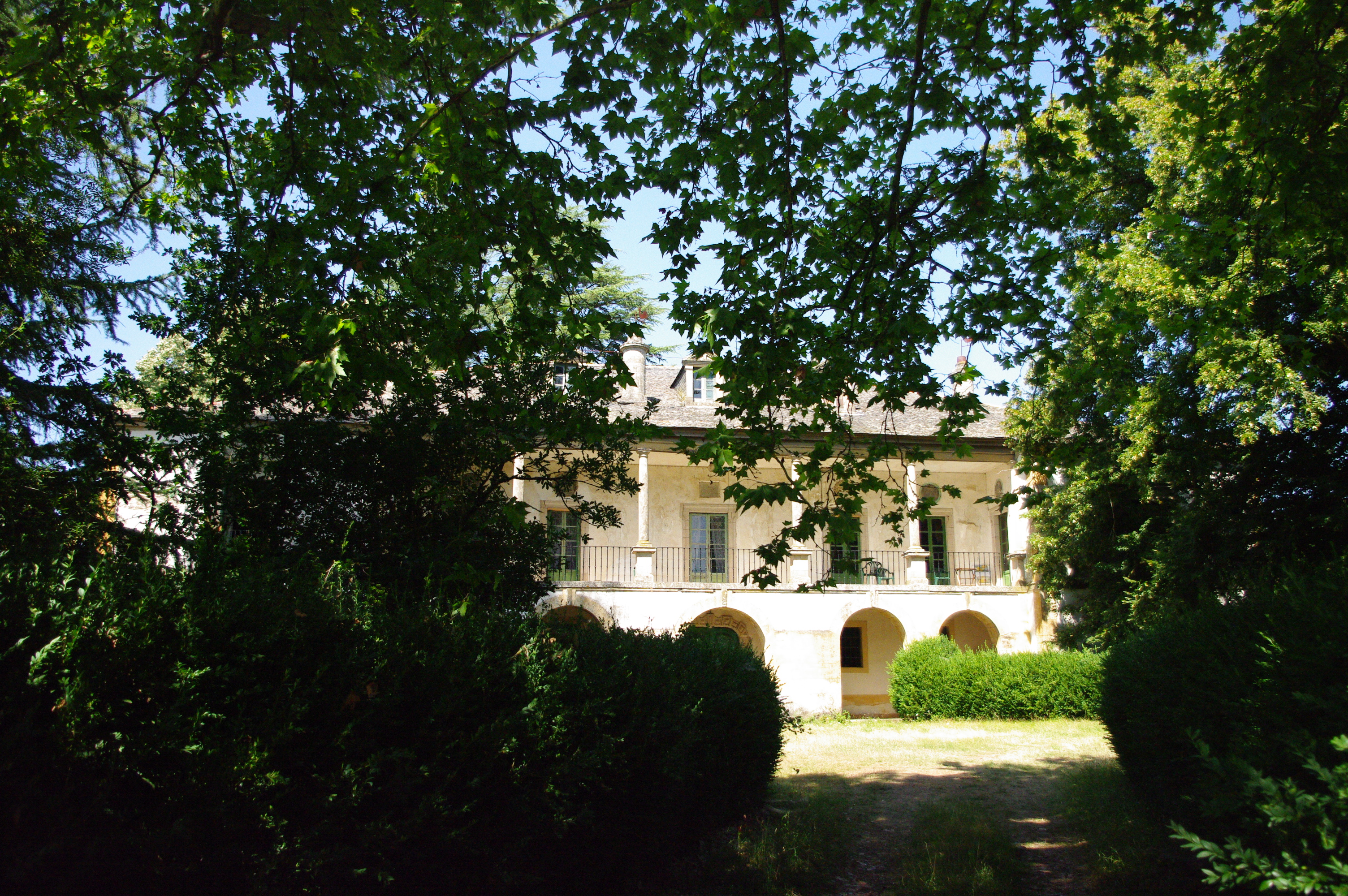 Pazo de Bóveda no concello do mesmo nome.